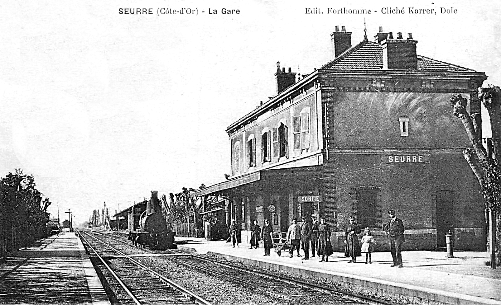 Intérieur de la gare de Seurre, avec le bâtiment voyageurs PLM et l'ensemble des installations.